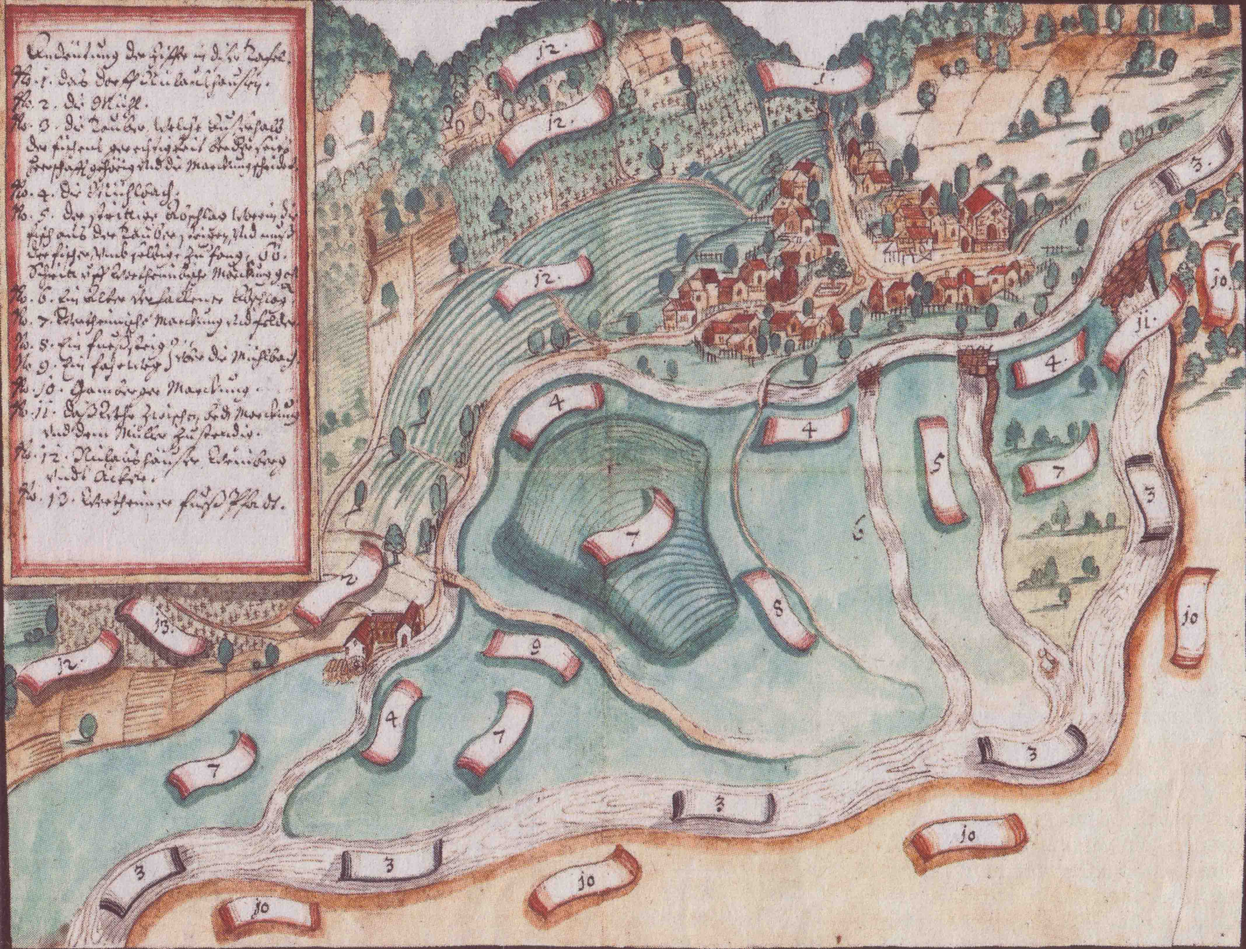 Niklashausen mit der Taubermühle (im rechten unteren Bildviertel) (Originalformat 38 × 50 cm)